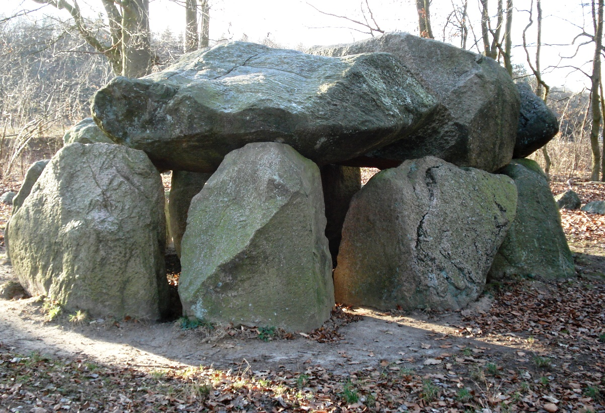 Grosssteingrab in Lübeck-Pöppendorf - aus Süden